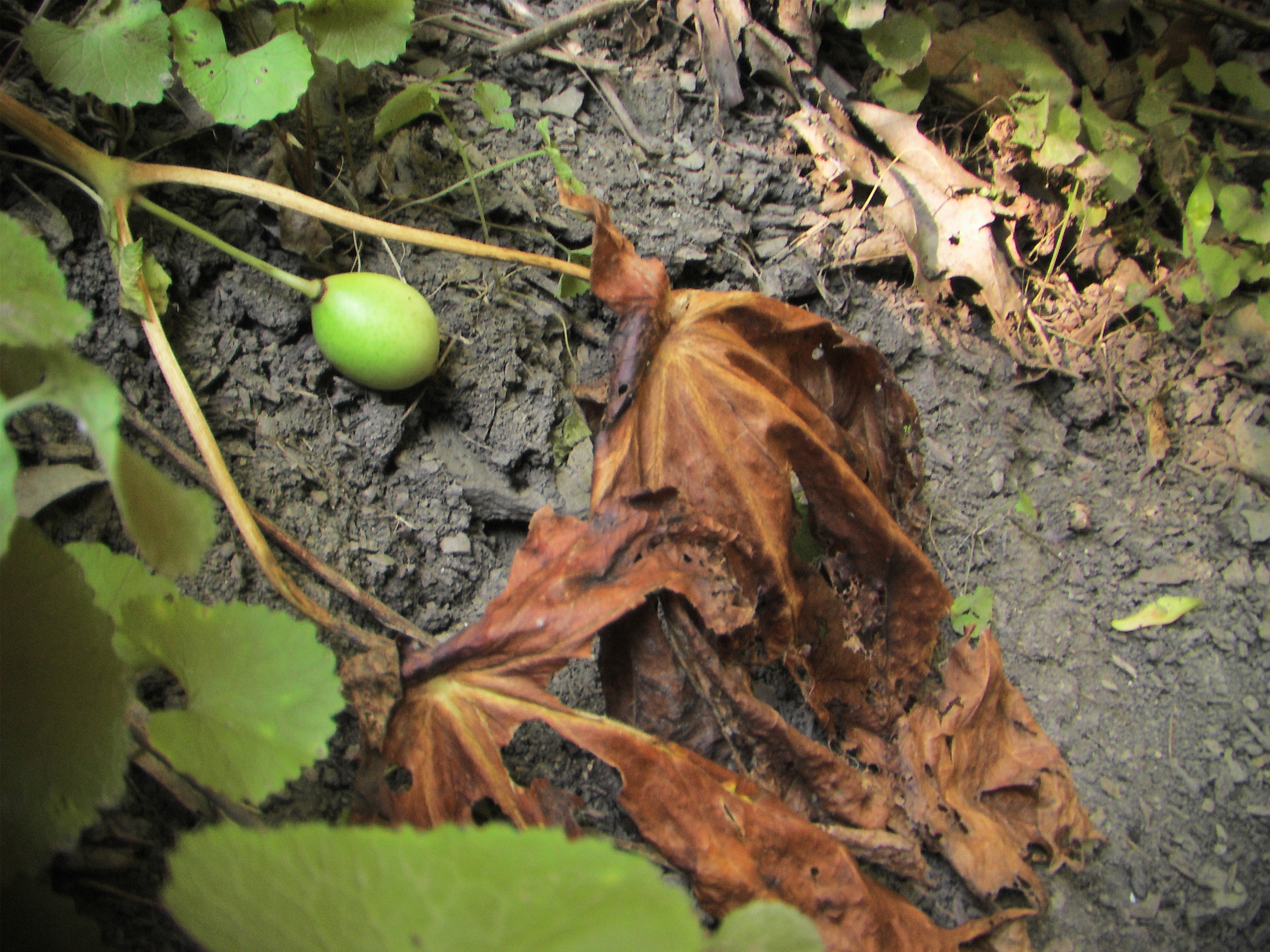 Mayapple fruit